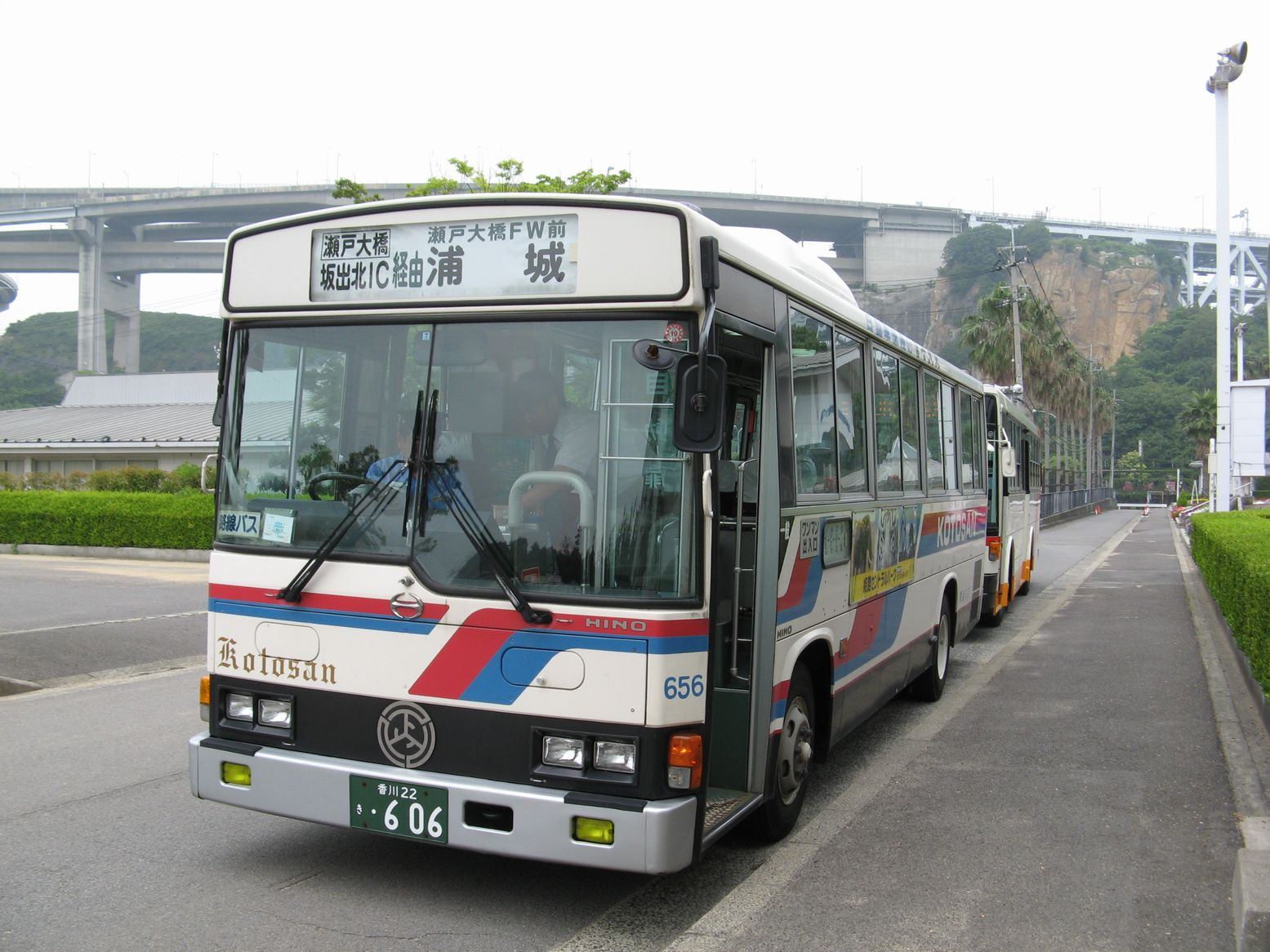 琴参バス 路線バス 日野 瀬戸大橋フィッシャーマンズワーフにて。後ろに下津井電鉄バスが並んでいる